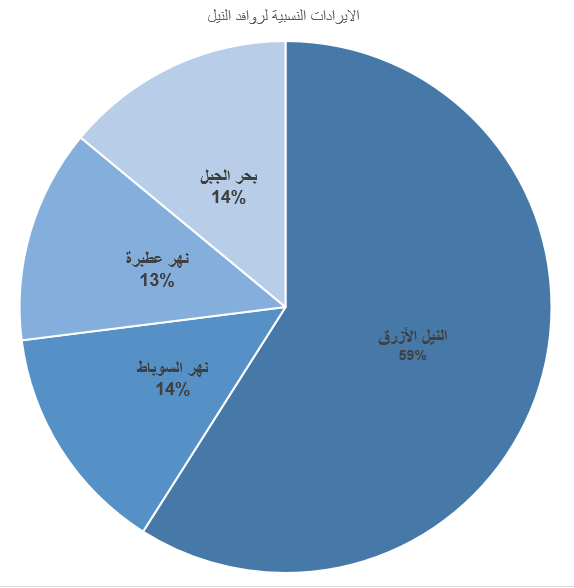 ايرادات روافد النيل كنسبة من الوارد عند أسوان